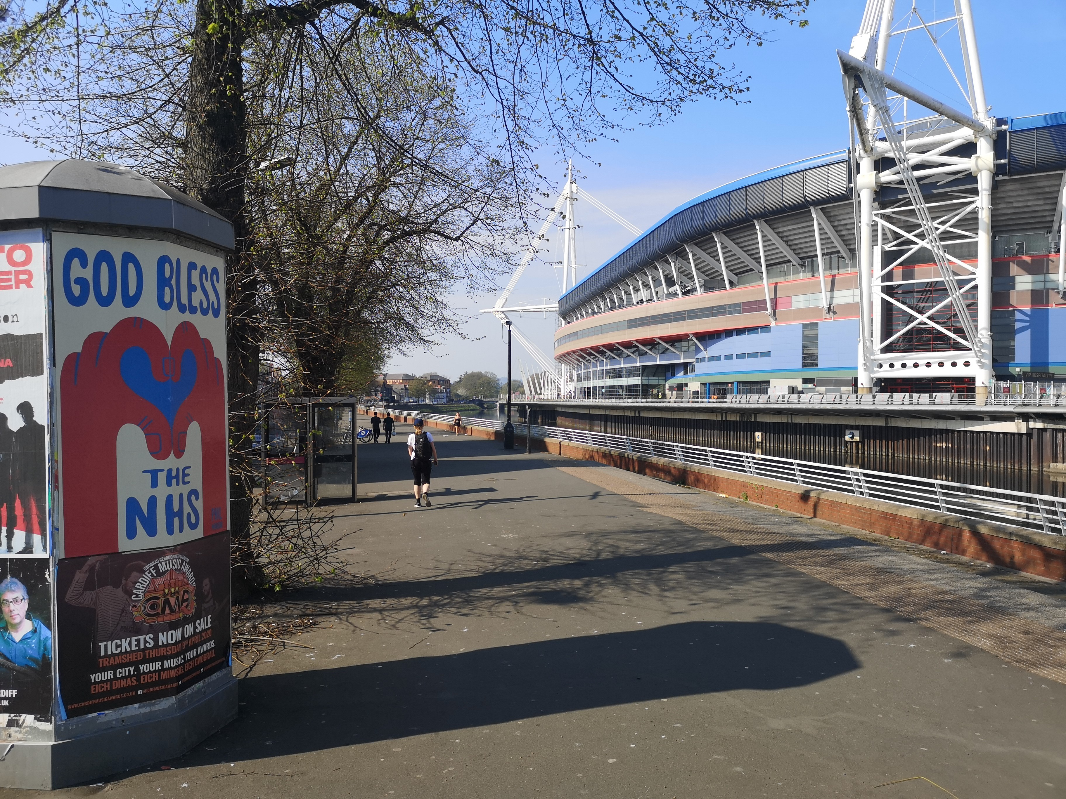 A walk on Good Friday afternoon